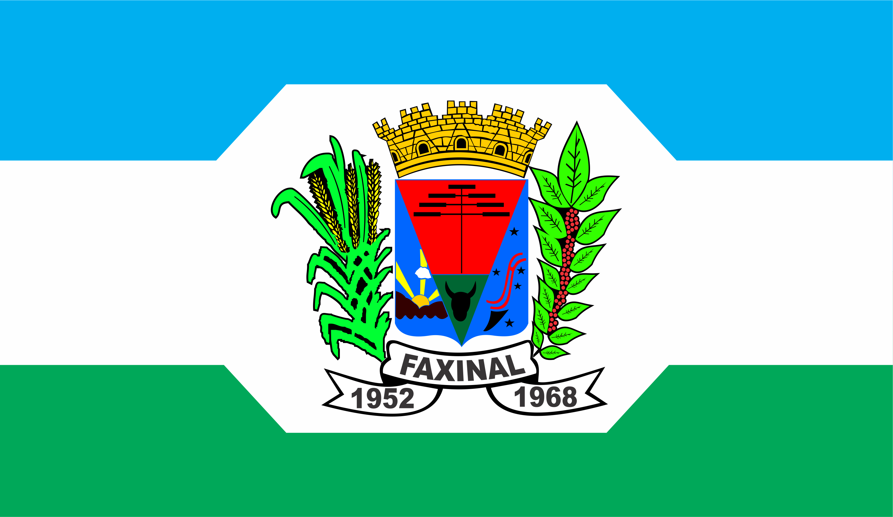 Bandeira do Município de Faxinal - PR